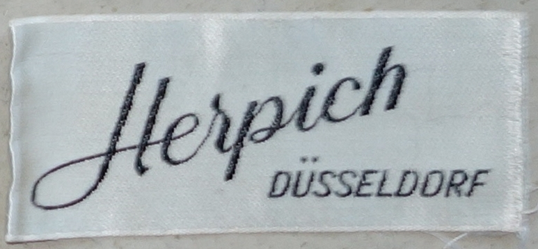 Web-Einnähetikett der Firma Herpich, Düsseldorf.